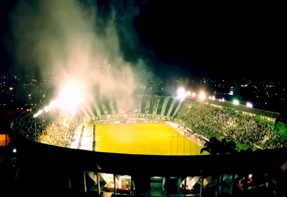 Estadio Ramón Aguilera Costas de noche